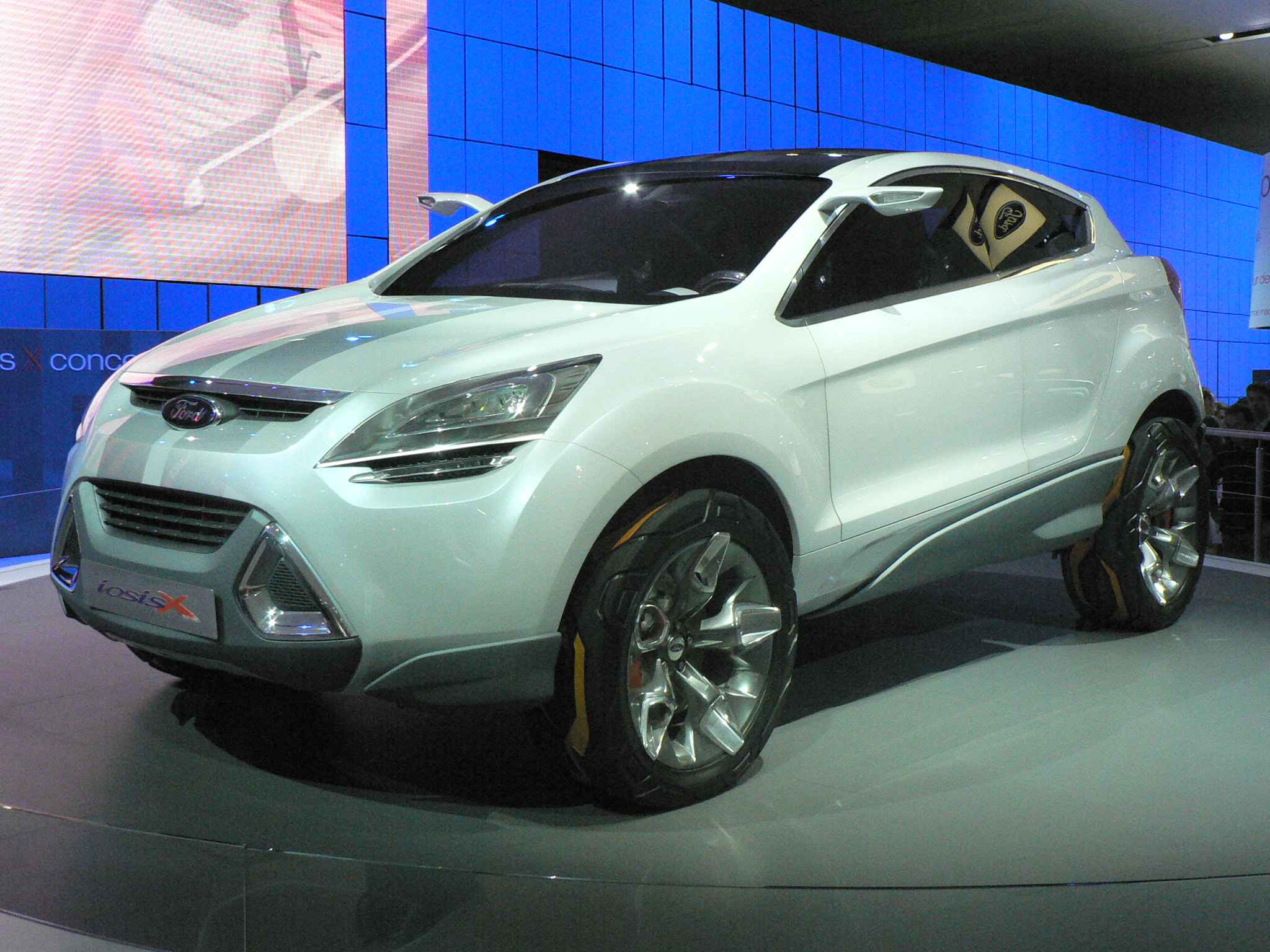 Mondial de l'automobile, Paris 2006